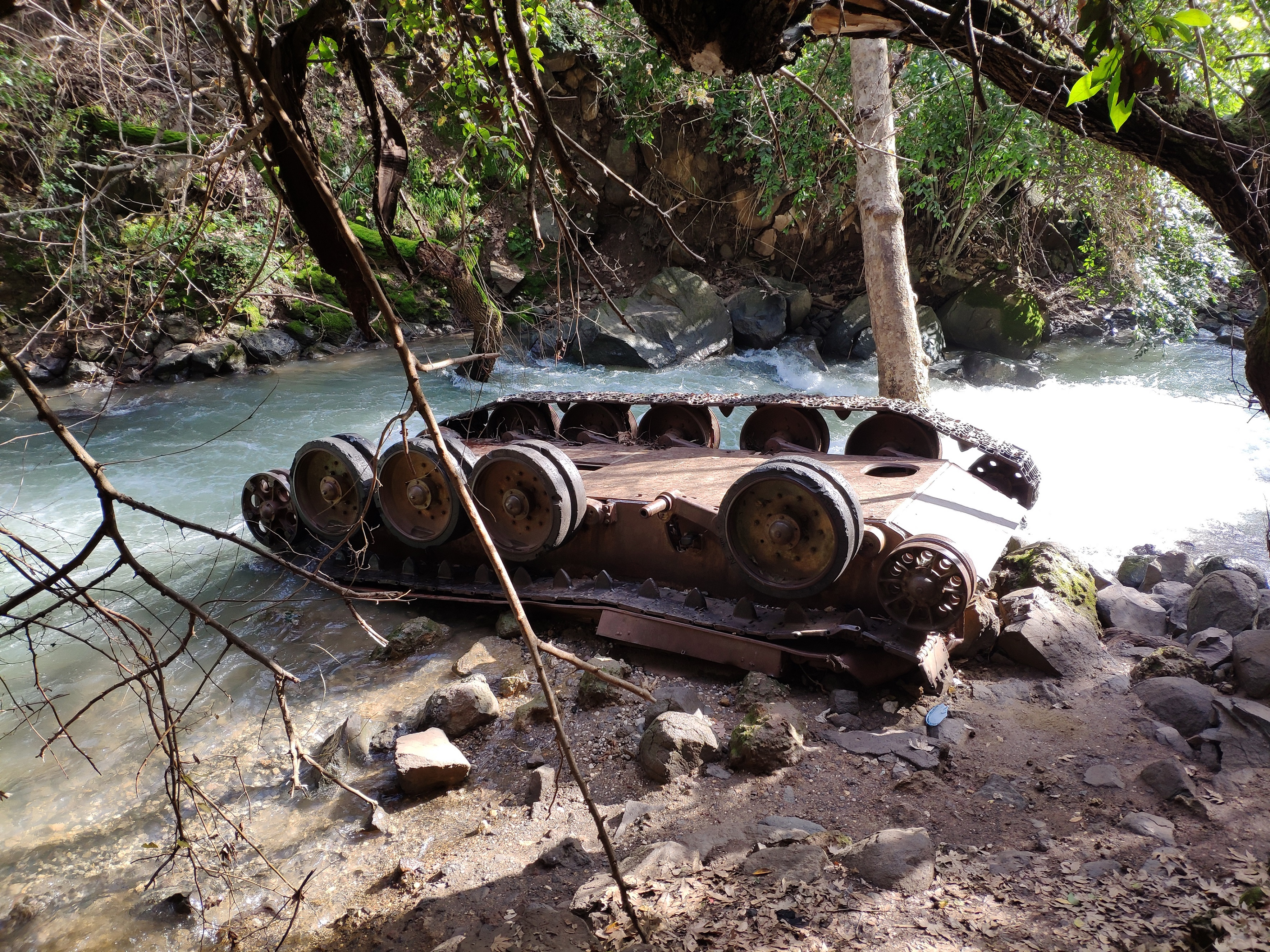 טנק T-34 סורי שהשתתף בהתקפה על קיבוץ דן ב-6 ביוני 1967. במהלך הנסיגה נפל הטנק לערוץ הבניאס והתהפך.